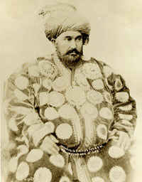 Эмир Бухары Музаффар-хан